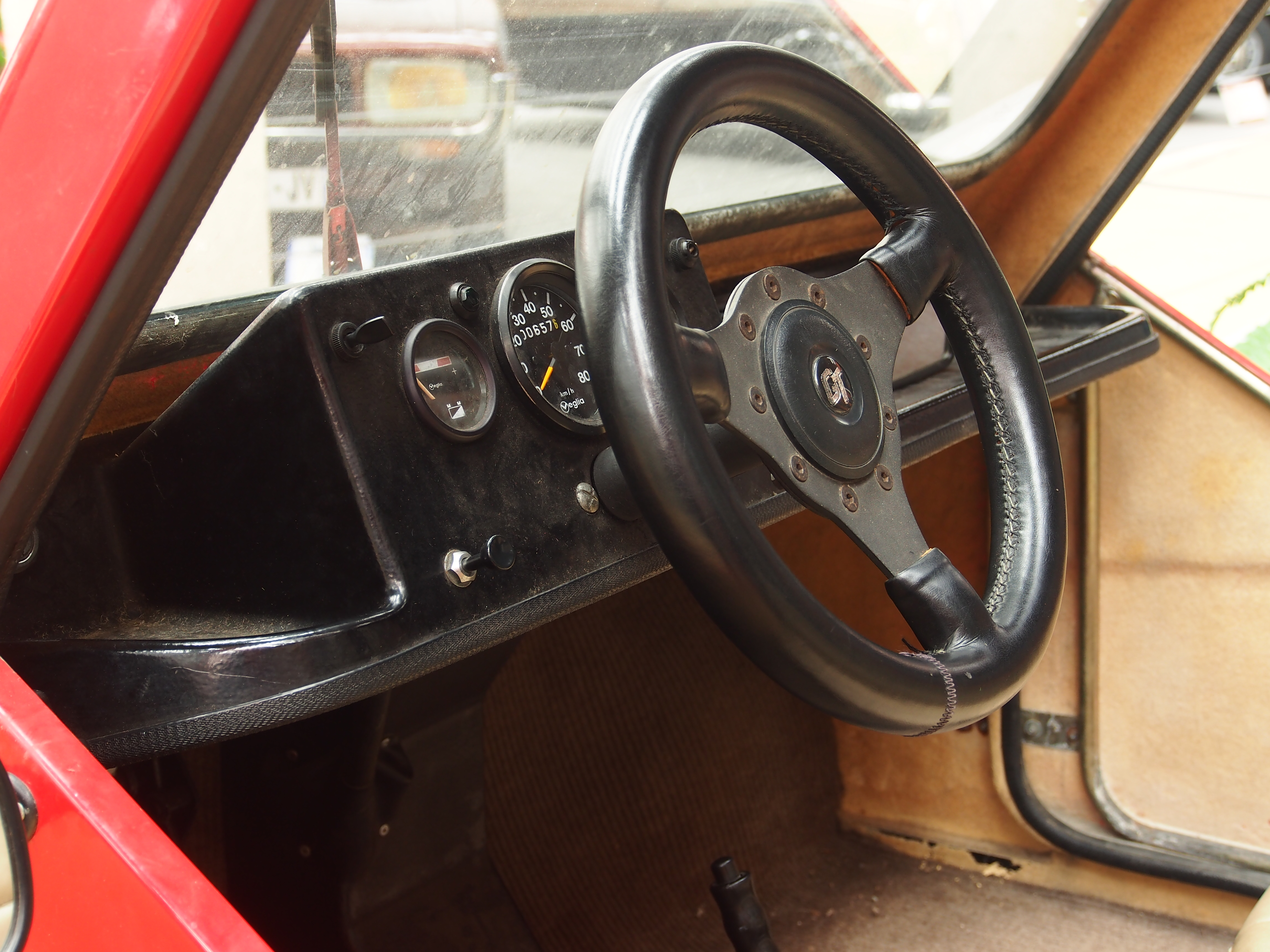 Photographed at the Association Lorraine des Amateurs d'Automobiles de collection et de loisirs.